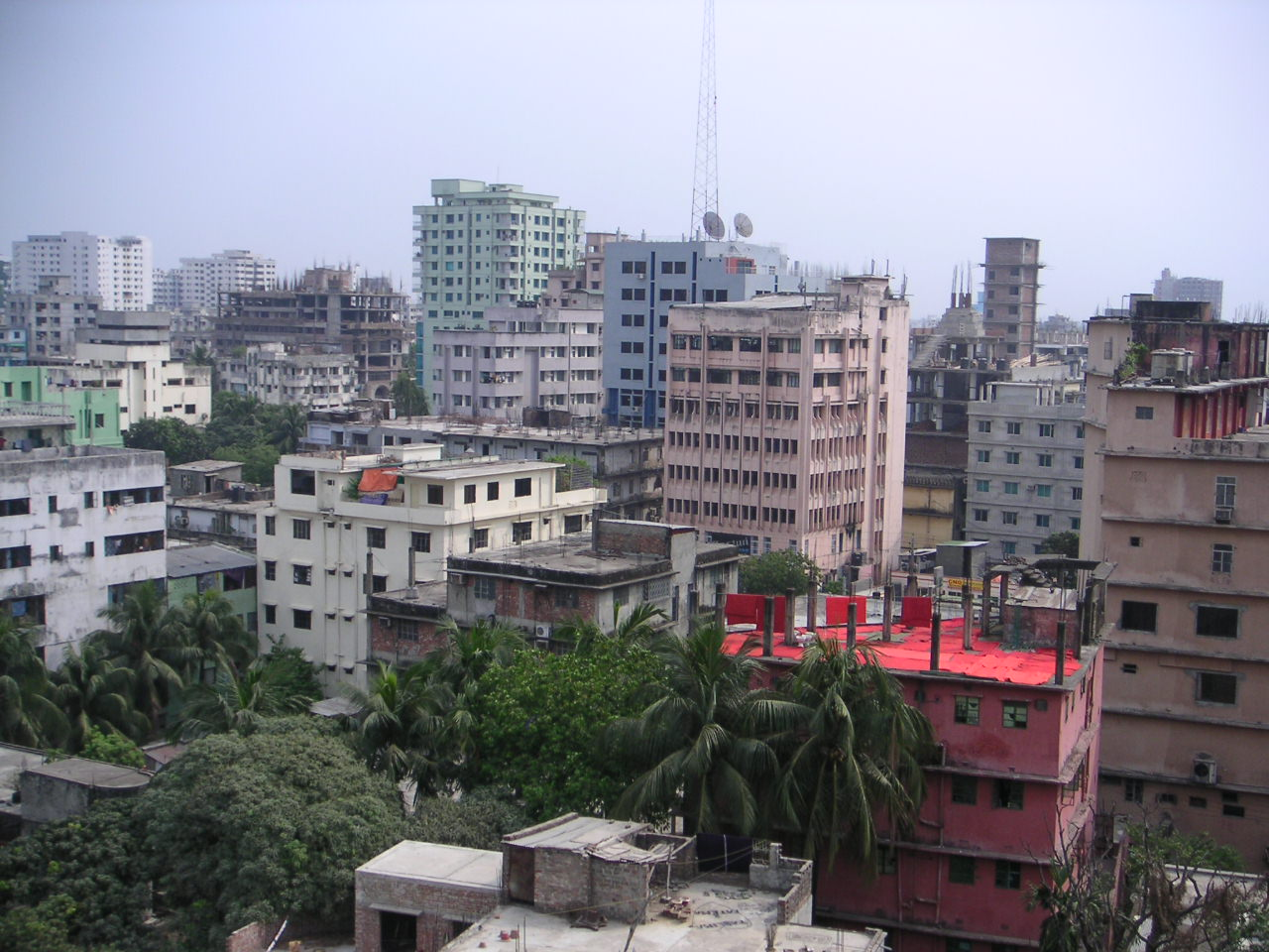 Dhaka. Photo: Soman